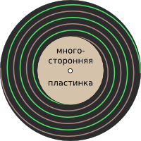 Объяснение многостороннего диска